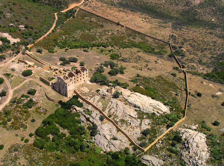 Ruines de la maison de chasse du prince Pierre-Napoléon Bonaparte au lieu-dit Luzzipeo - Commune de Calenzana